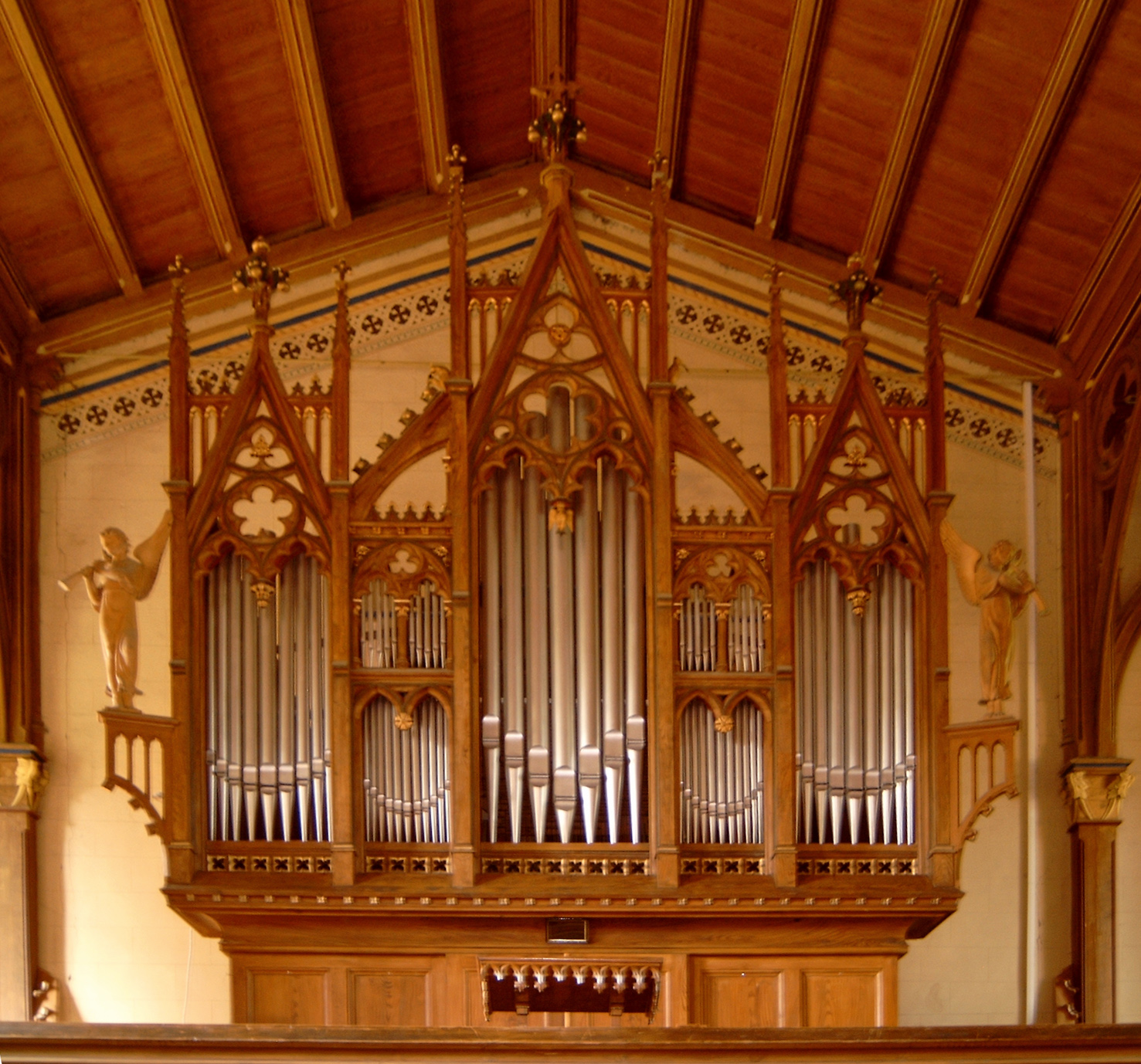 Orgelprospekt, Bad Bibra